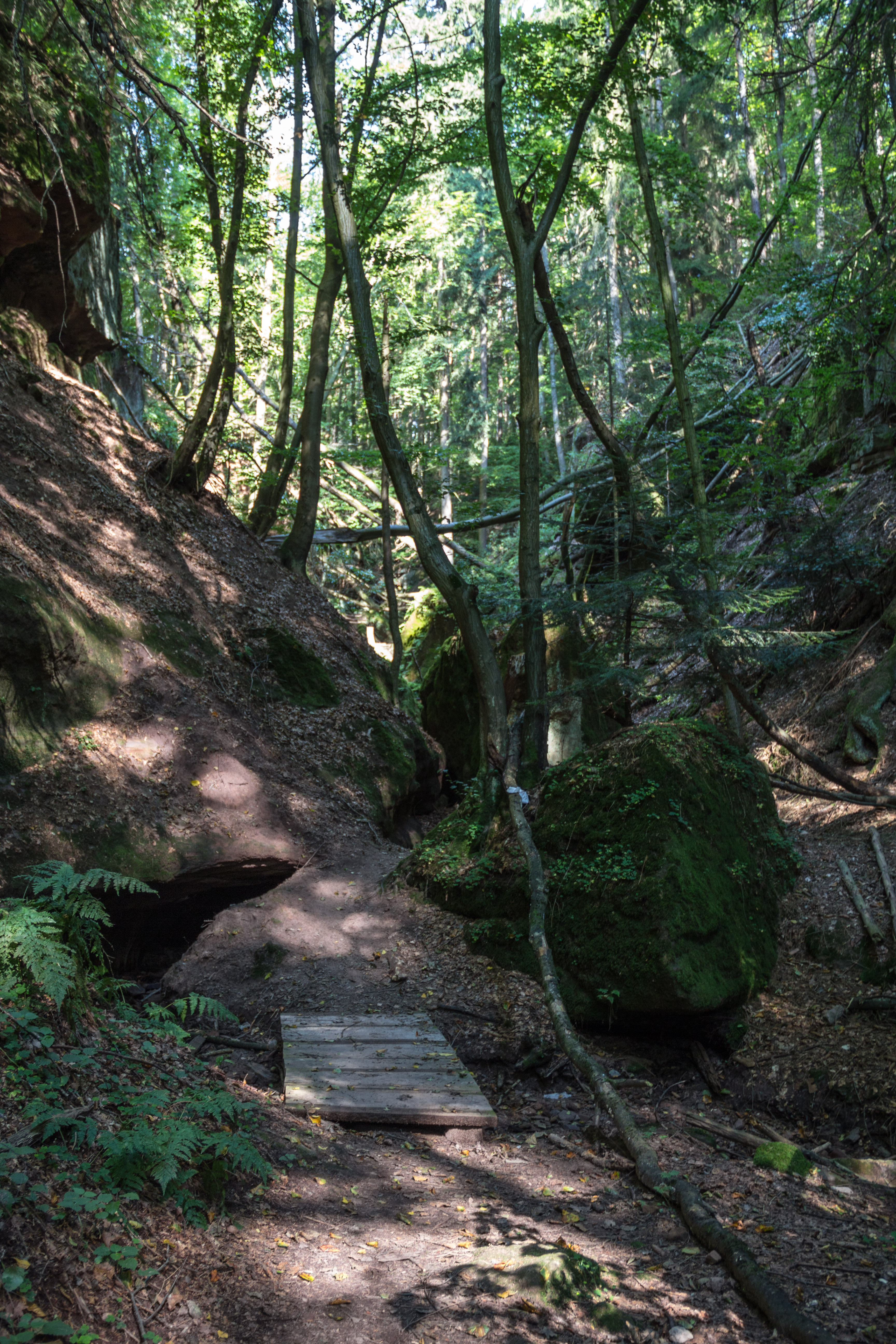 Massendorfer Schlucht, Wegweiser